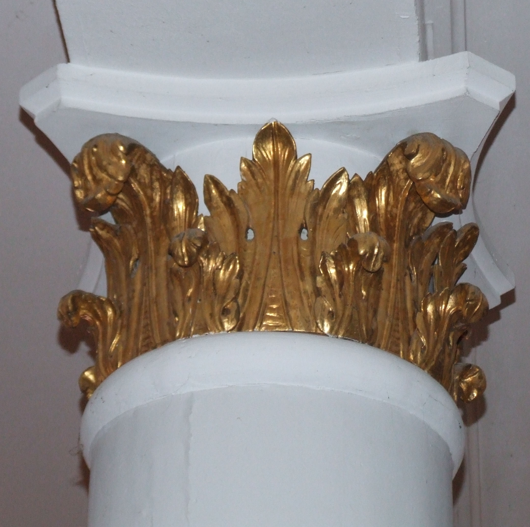 Pfarrkirche St. Vitus in Löningen